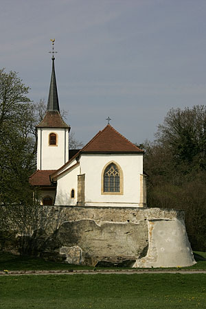 L'église de Vallon